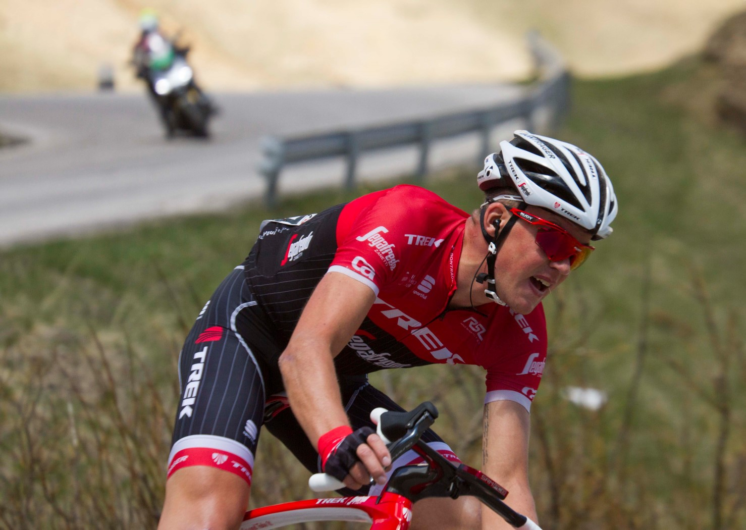 176 pedersen